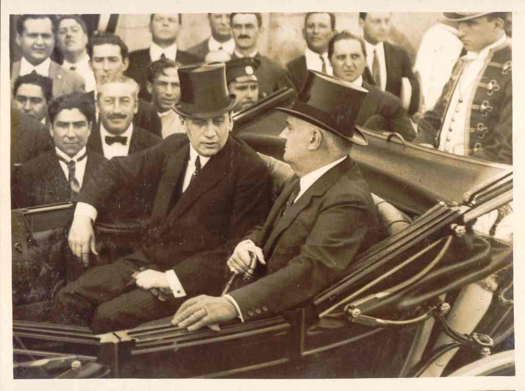 Arturo Alessandri Palma junto al presidente argentino Marcelo Torcuato de Alvear, sobre una carroza, rodeados de gente.